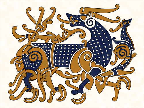 Grabstein von St. Paul, London, Großbritannien. Umzeichnung mit mutmaßlicher originaler Farbgebung.